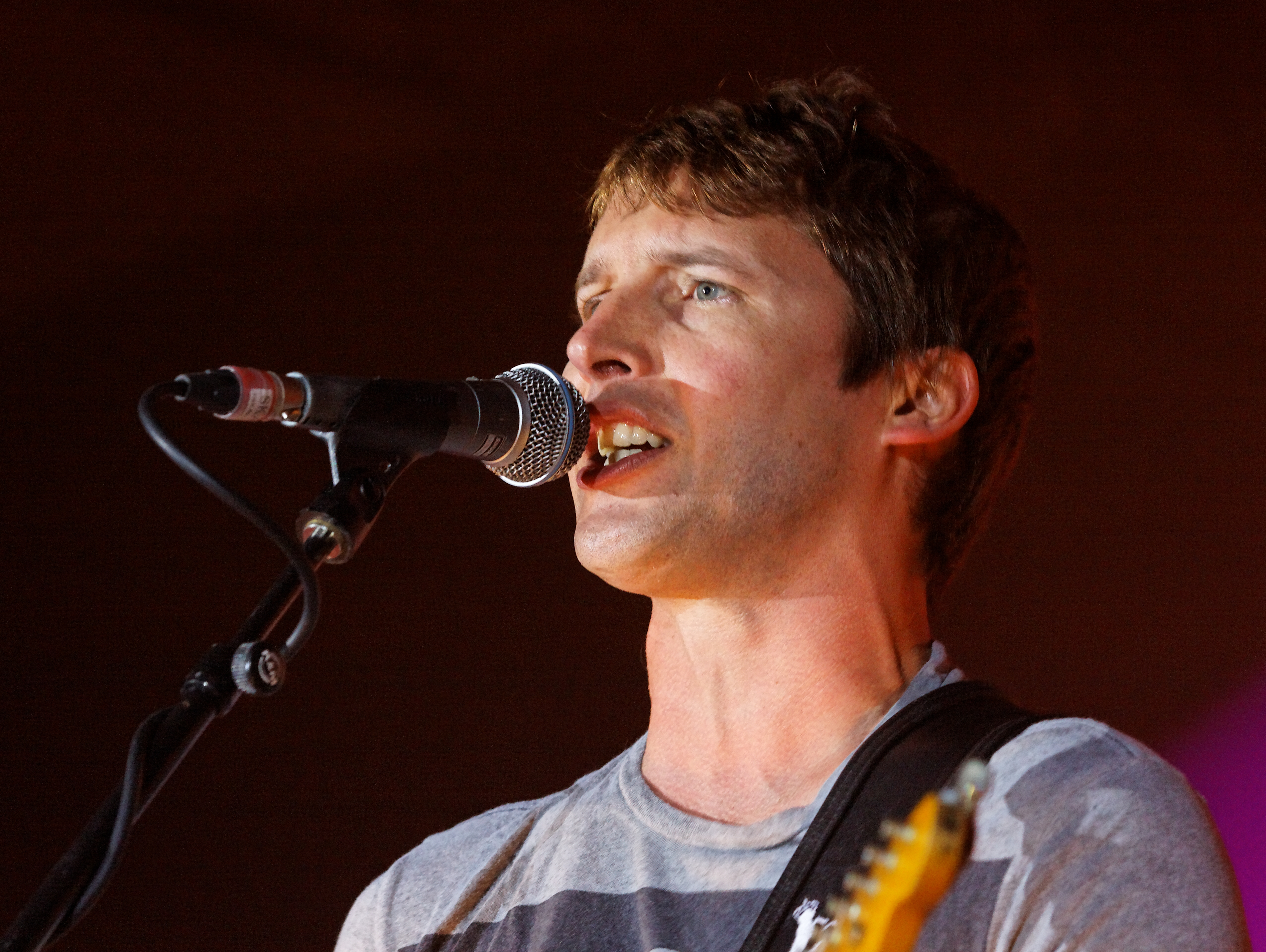 James Blunt en concert le 19 juillet lors du festival de Cornouaille 2011.